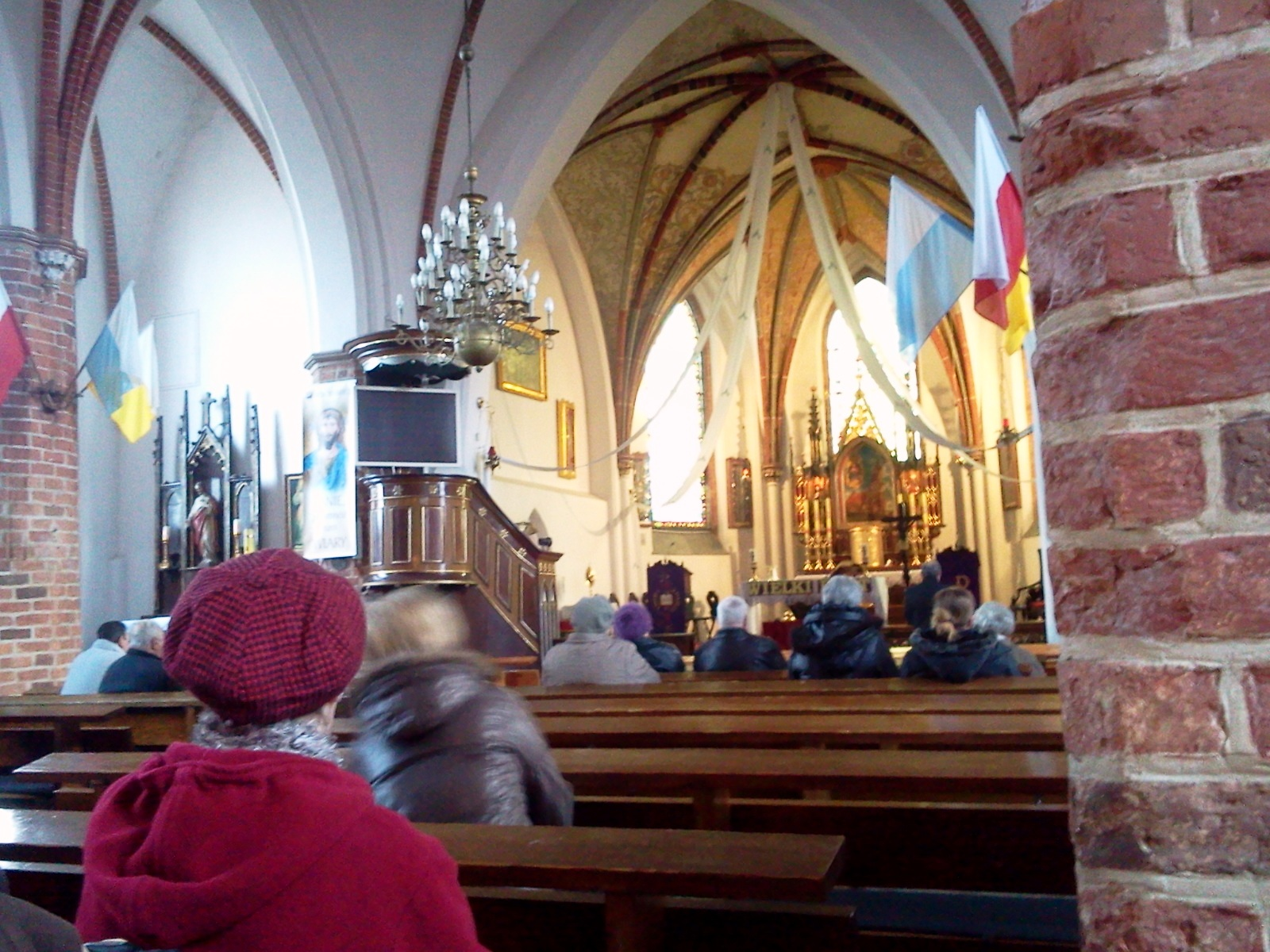 Kościół - głębi ołtarz w nawie bocznej lewej